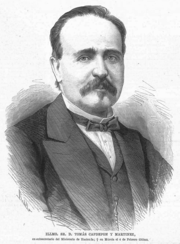 Ilmo. Sr. D. Tomás Capdepón y Martínez.